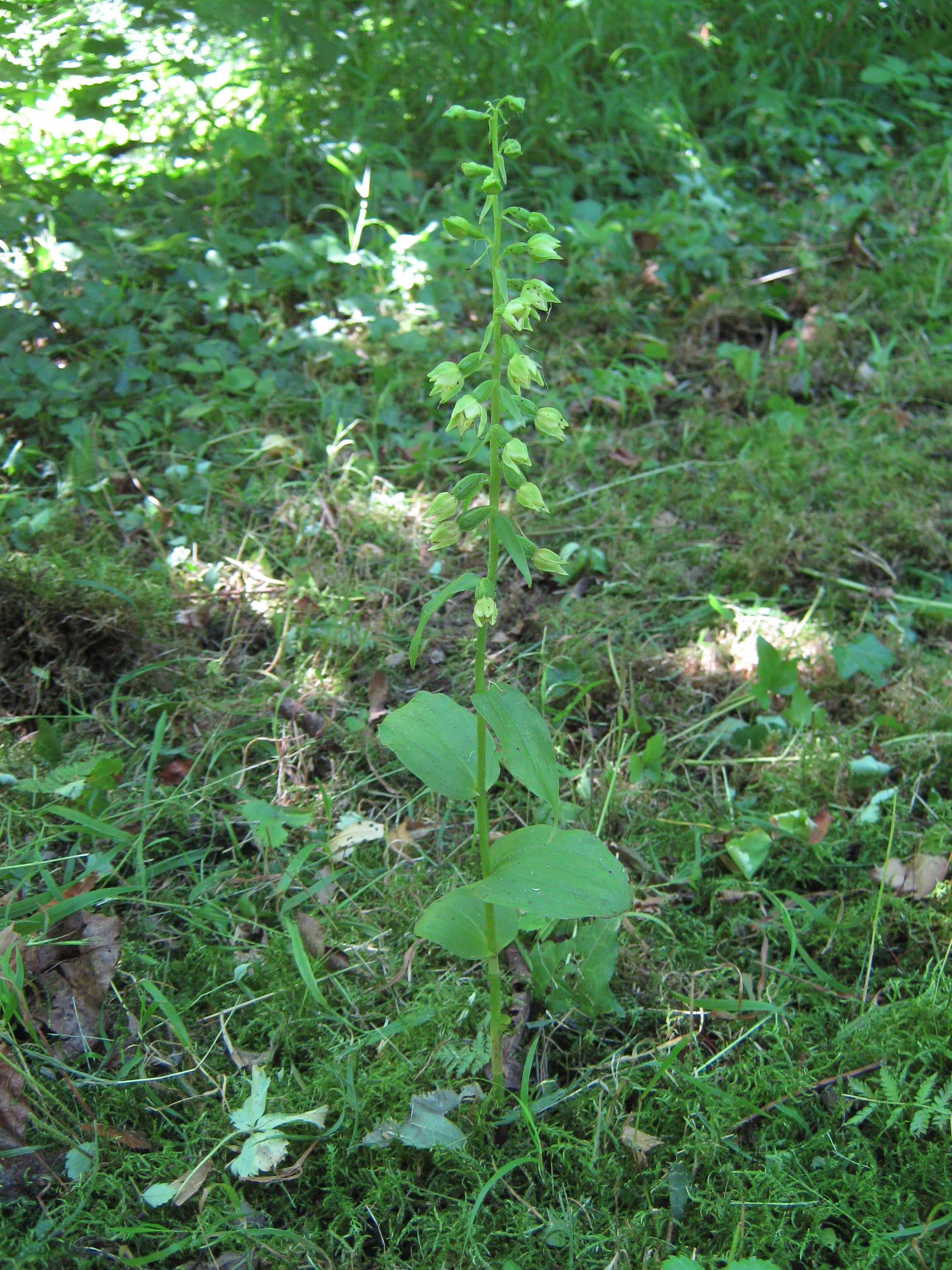 Epipactis albensis, besonders stattliches Exemplar, ca. 35 cm hoch